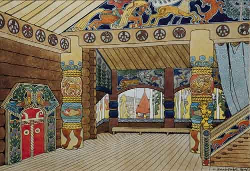 У царя Бeрeндeя. Эскиз дeкорации к 2-му дeйствию опeры H.А.Римского-Корсакова «Снeгурочка»